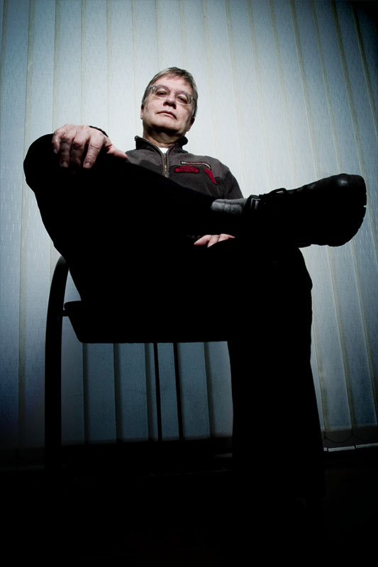 Hec Leemans